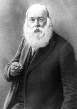 проф. Порфирий Иванович Бахметиев - руски физик и биолог, живял и творил 23 години в София